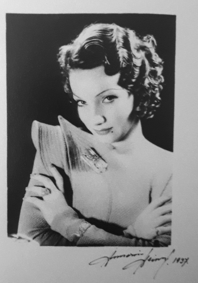 Carmen Miranda em foto da premiada fotógrafa alemã naturalizada argentina Annemarie Heinrich (Buenos Aires, 1935)